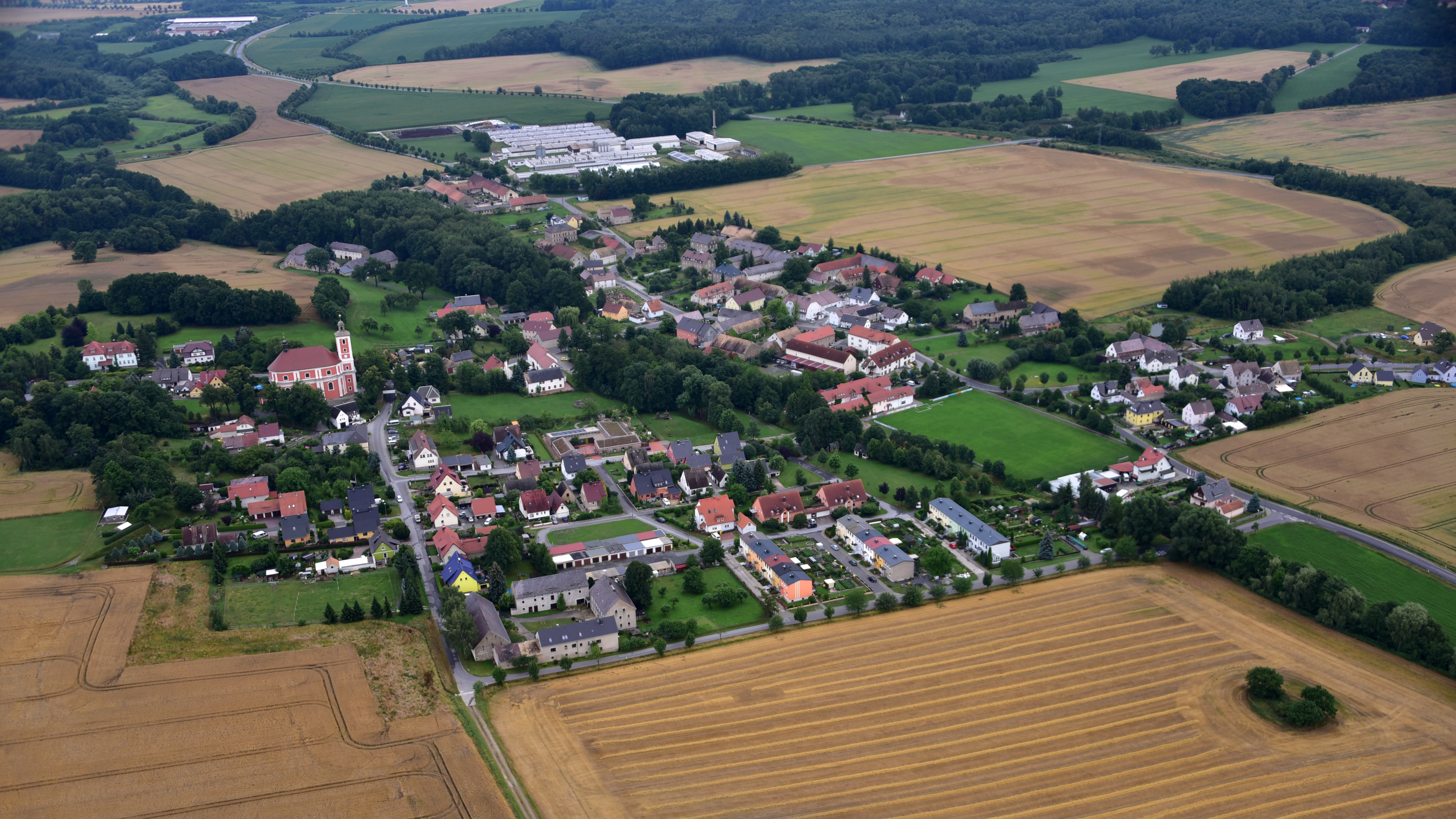 Nebelschütz, Luftaufnahme (2017) Hornjoserbsce: Powětrowy wobraz Njebjelčic (2017)